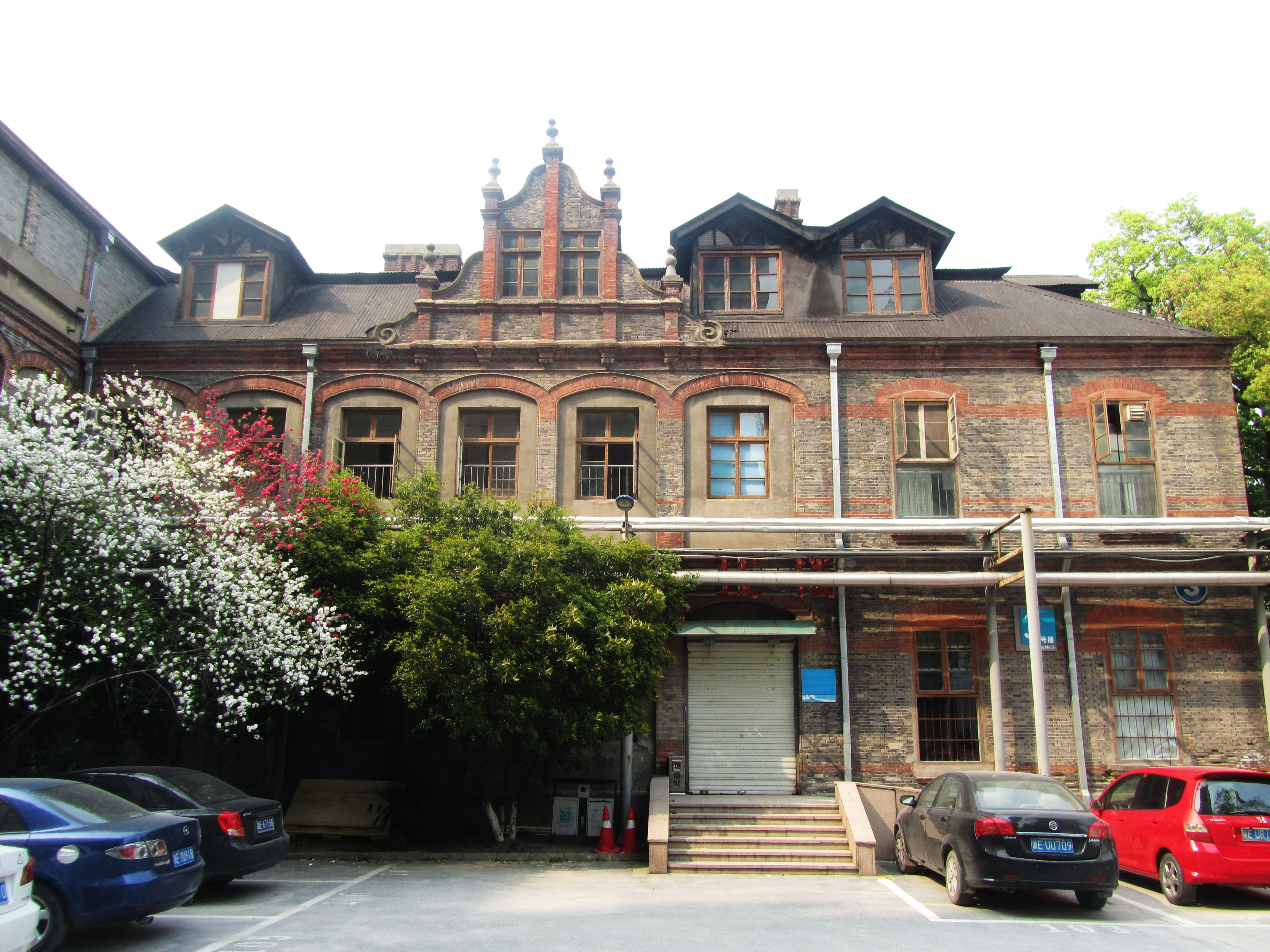 湖郡女校旧址，东楼南面。